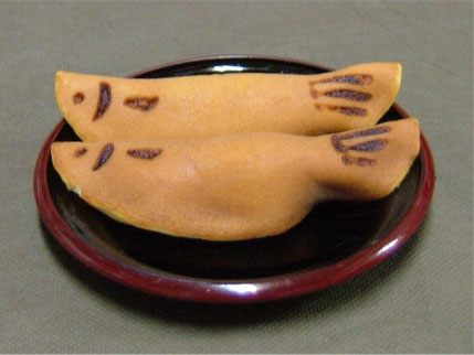 若あゆ（和菓子）